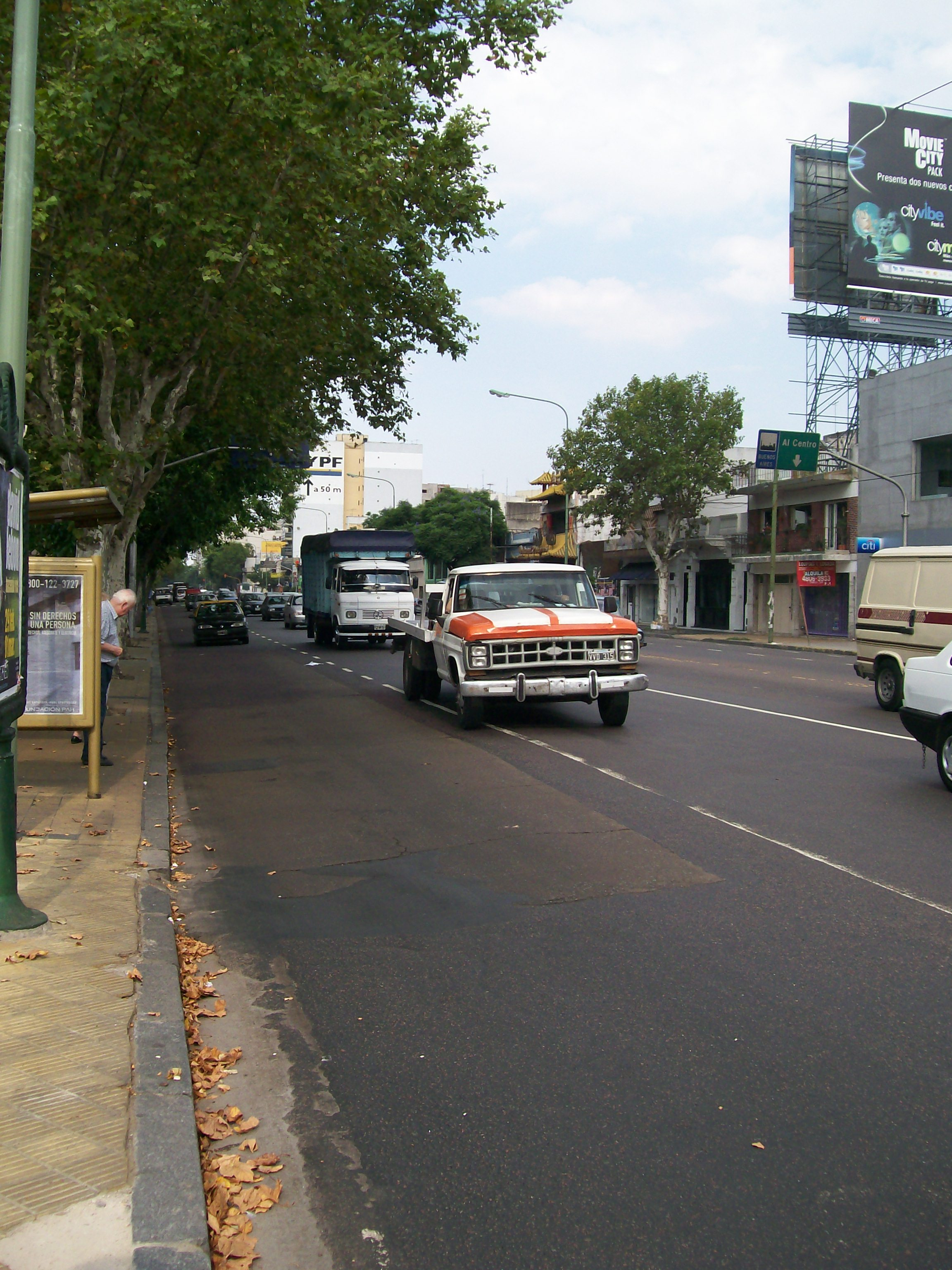 Avenida San Martin en buenos aires